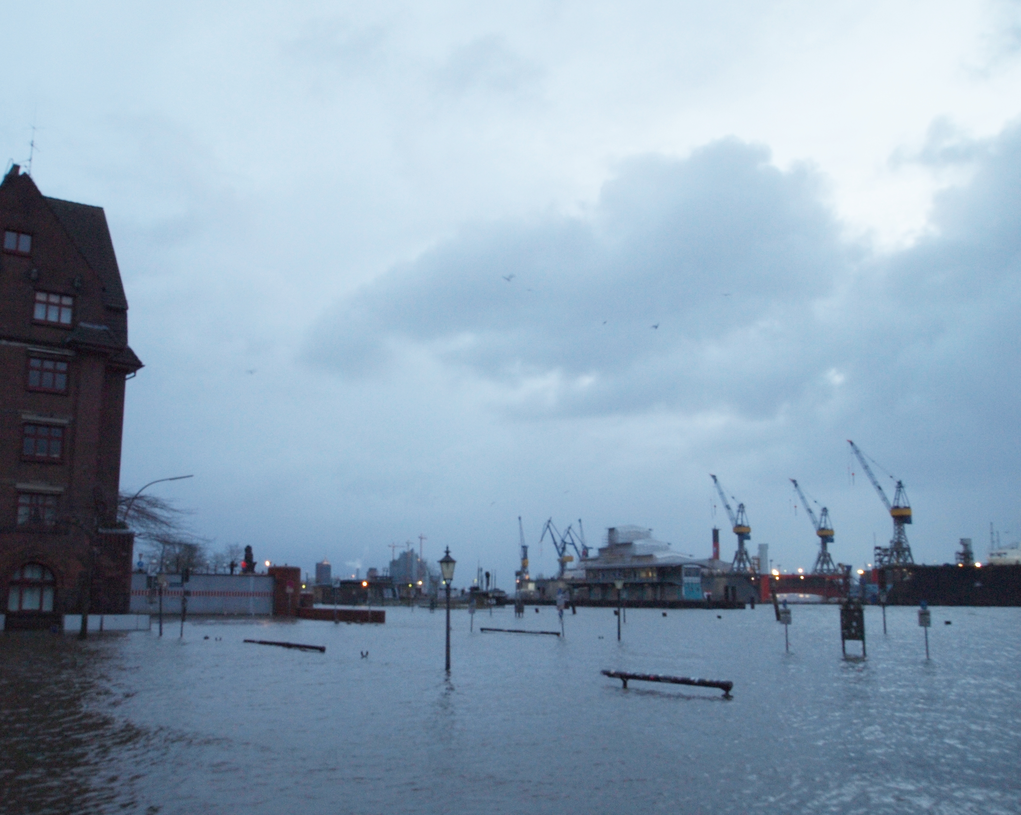 nach der sturmflut auf dem altonaer fischmarkt, (2 stunden nach dem scheitelpunkt) hier bei pegelstand st. pauli ca. 10 meter bzw. 700 cm über seekarten null; blick richtung elbphilharmonie